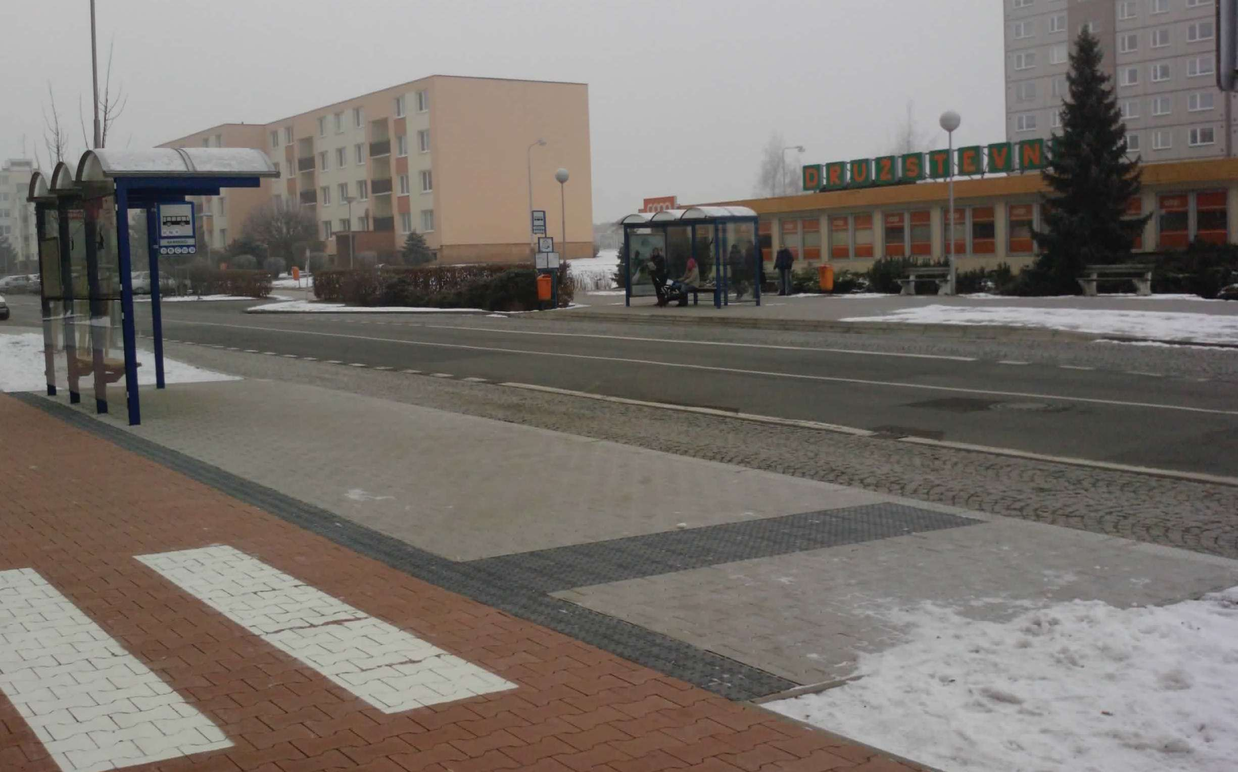 Zastávka se zastávkovým zálivem a kasselskými obrubníky